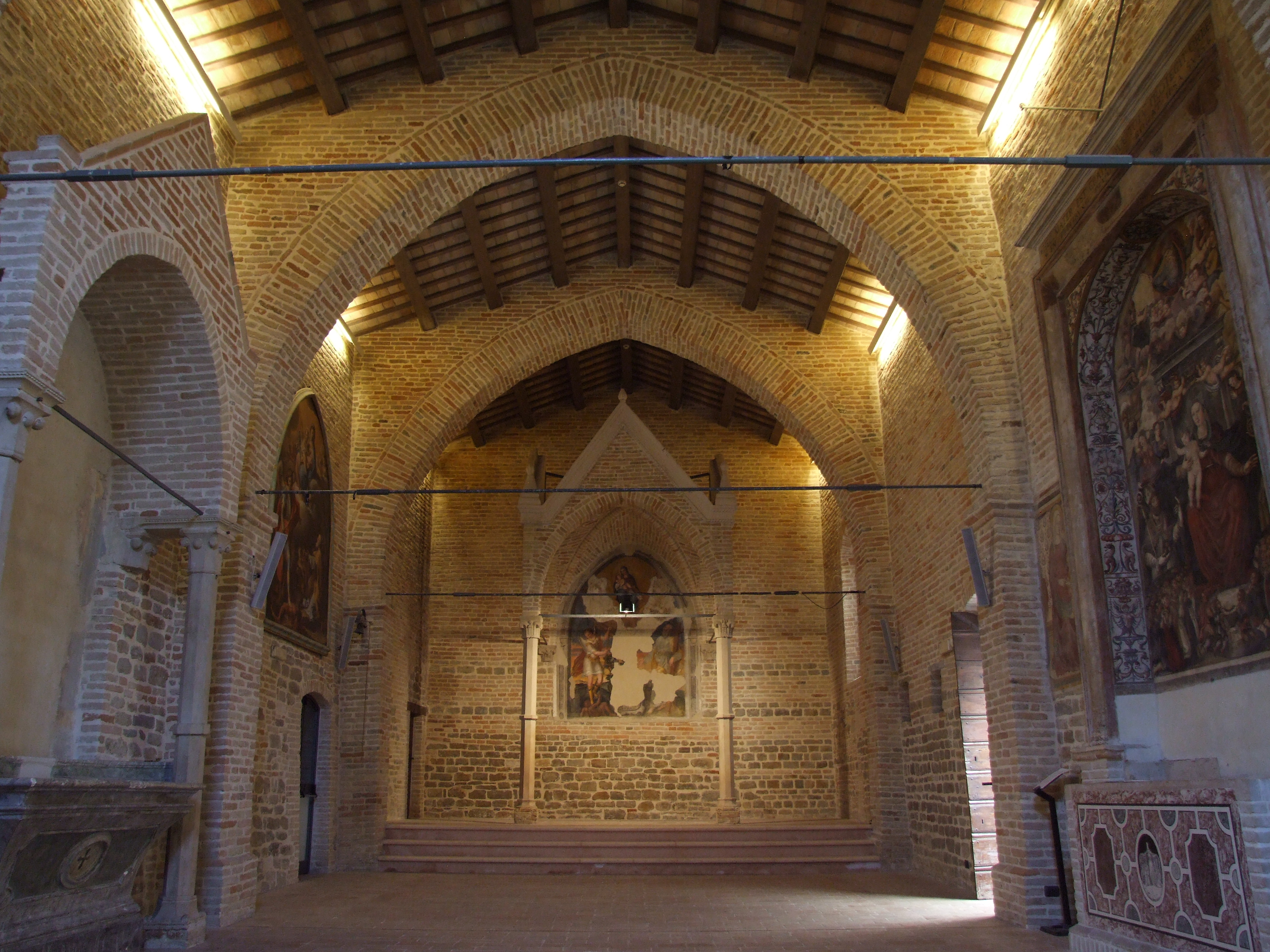 Chiesa di San Michele - Edificata nel 1290 dai monaci benedettini camaldolesi dell’Abbazia di S. Maria di Sitria, fu poi rimaneggiata fra il 1442 ed il 1480. This is a photo of a monument which is part of cultural heritage of Italy.